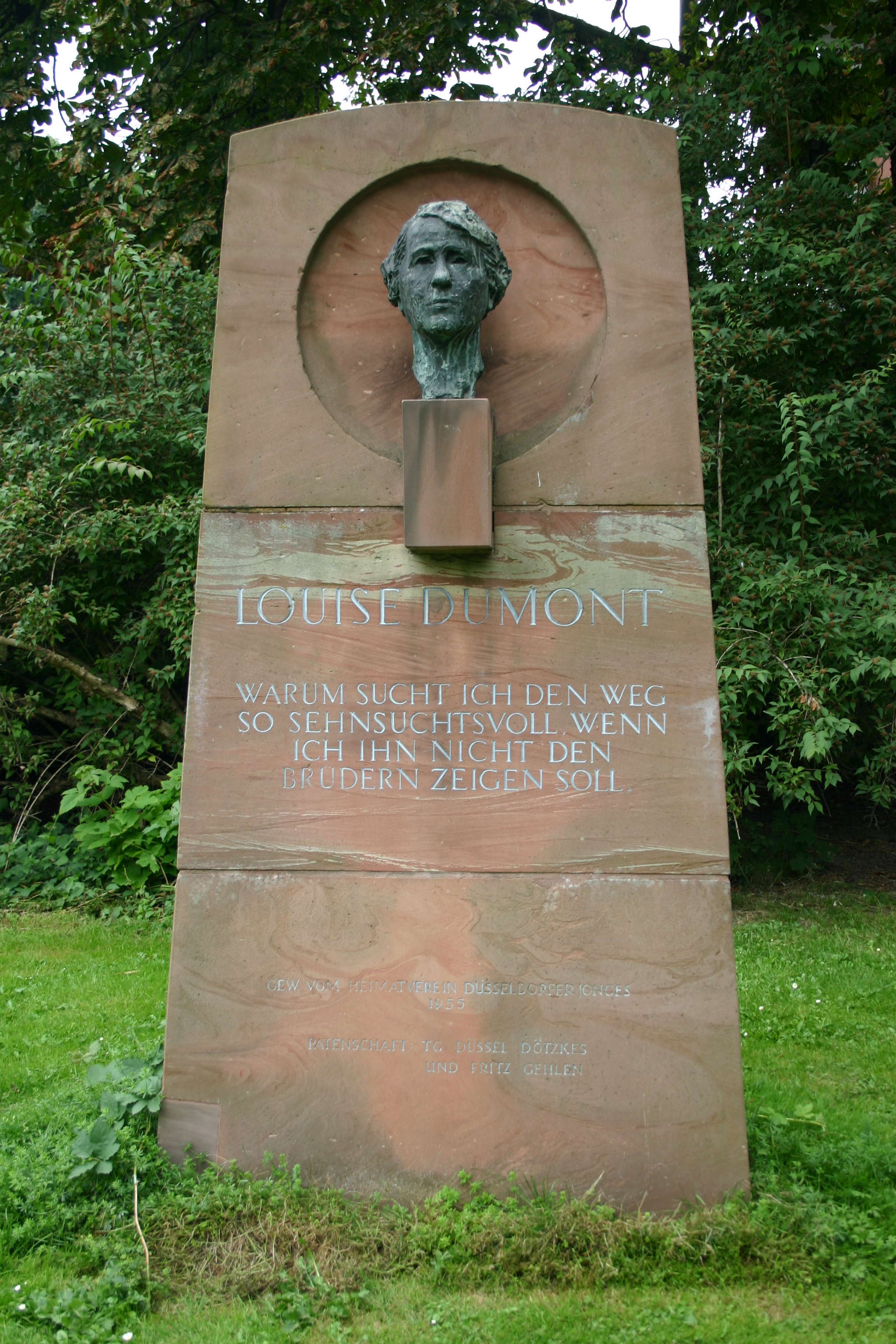 Denkmal für Louise Dumont im Hofgarten Düsseldorf / Nordrhein-Westfalen. (Am 22.12.2012 teilte die Neue Ruhr Zeitung mit, dass die „40 Zentimeter hohe Bronzestatue der Schauspielerin, Regisseurin und Intendantin (1862-1932) vom Sockel geholt und gestohlen” wurde.)